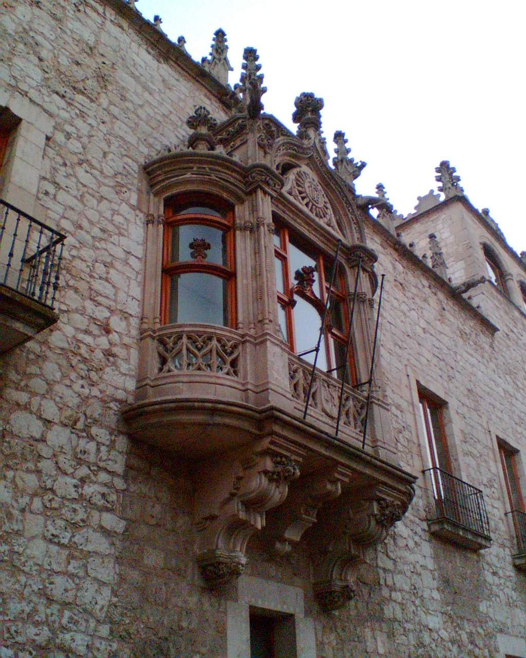 Una de las ventanas de la fachada Sur de la Casa del Cordón Tomada: 16/09/2005 Cámara: Nokia 6230i